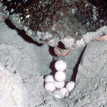 Caretta caretta. Eggs.